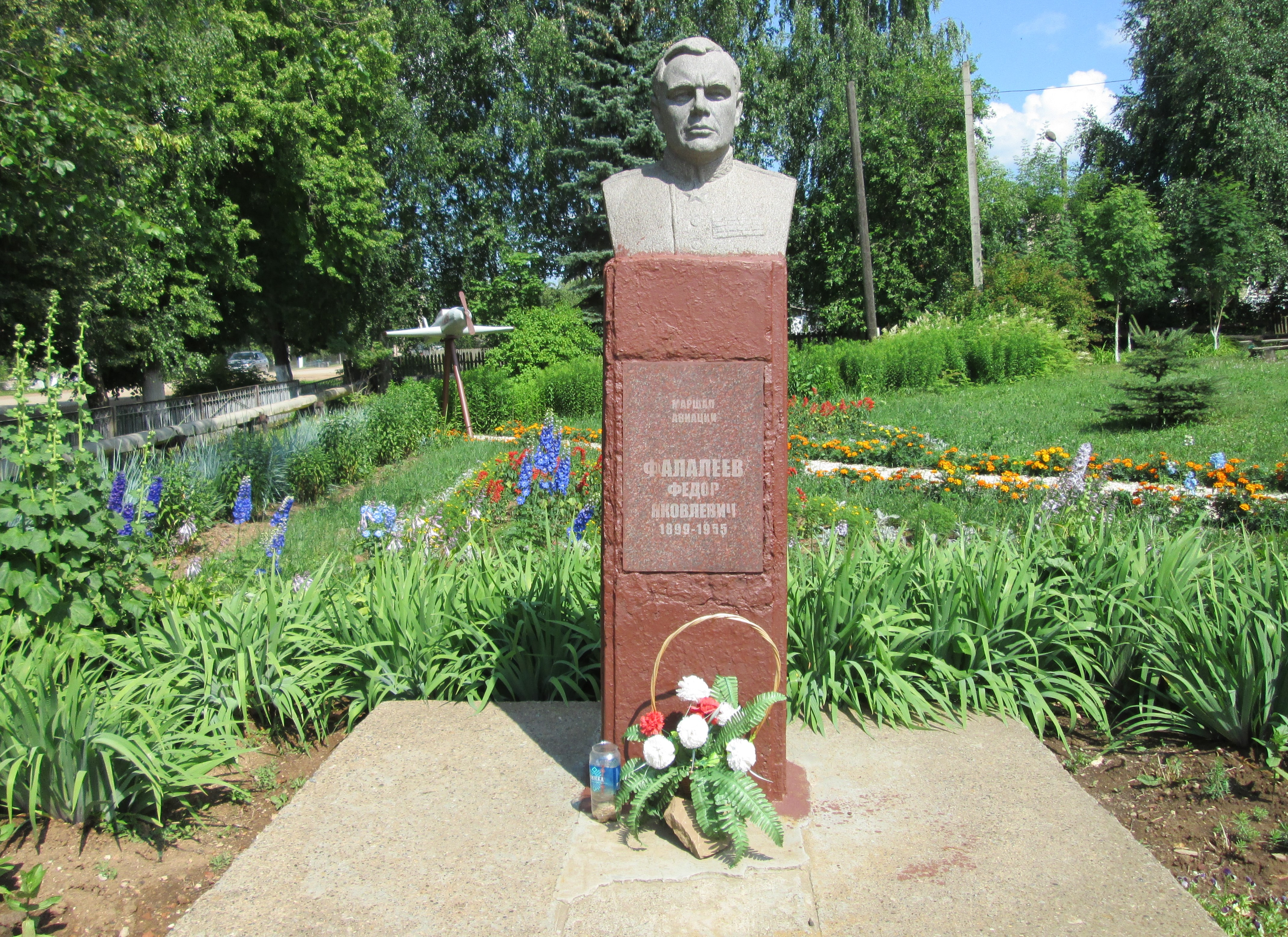 Территория Большеучинской средней школы.Большая Уча,ул.Садовая,8